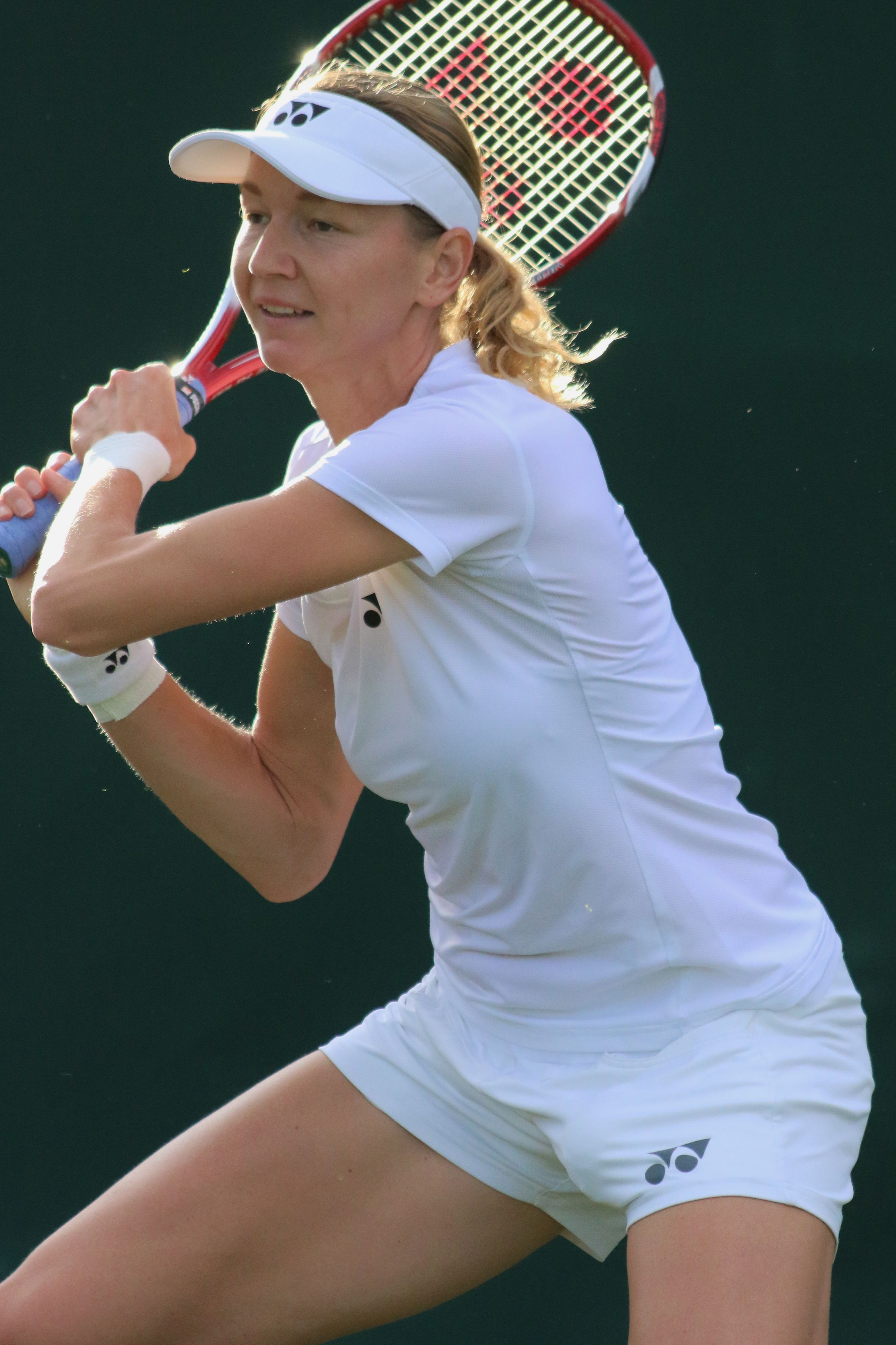 Voracova WM16 (10)